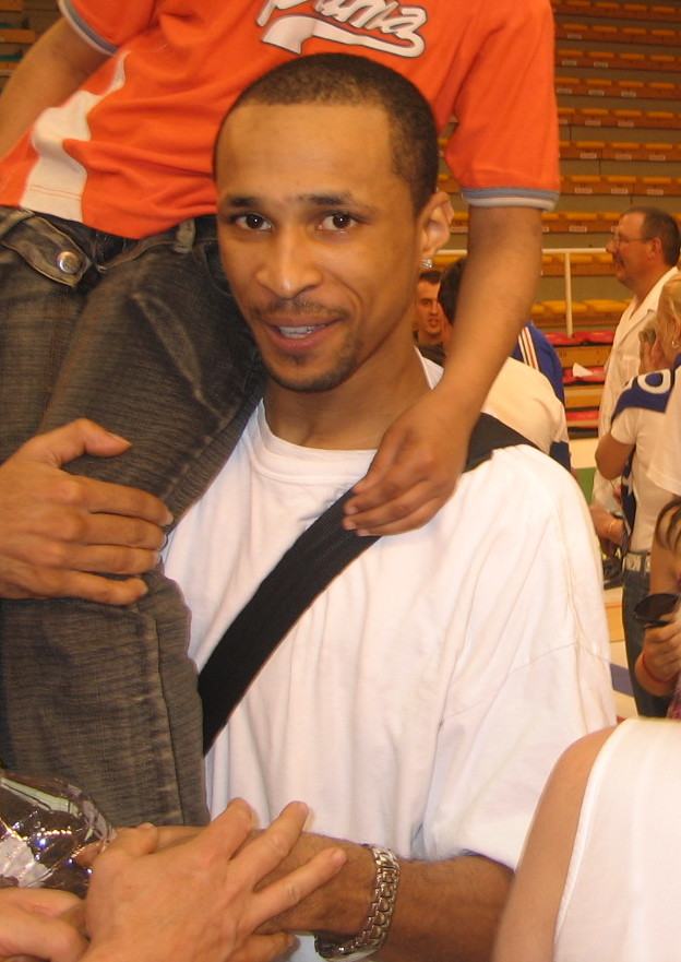 Dewarick Spencer après le match